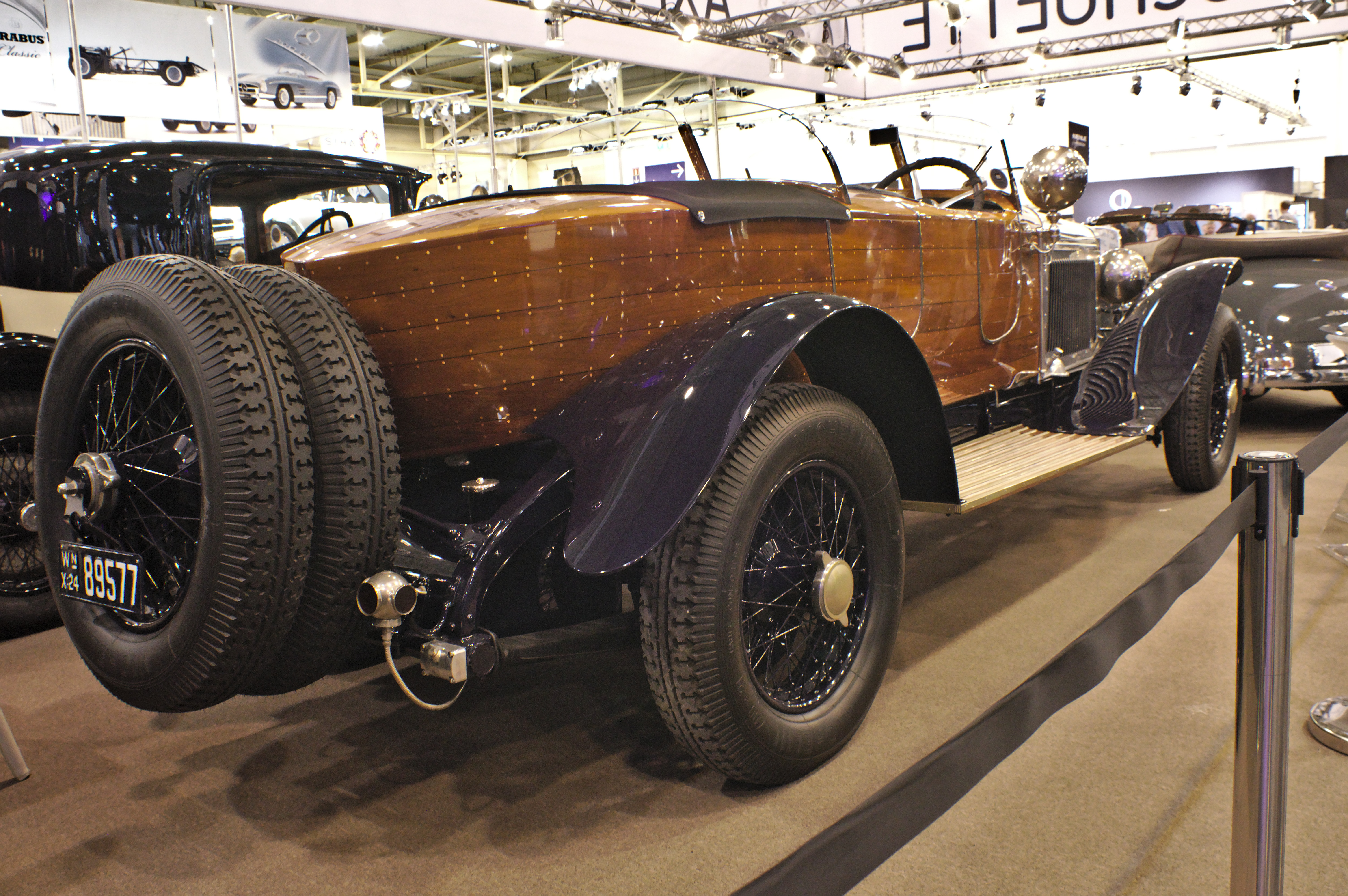 Techno Classica 2018